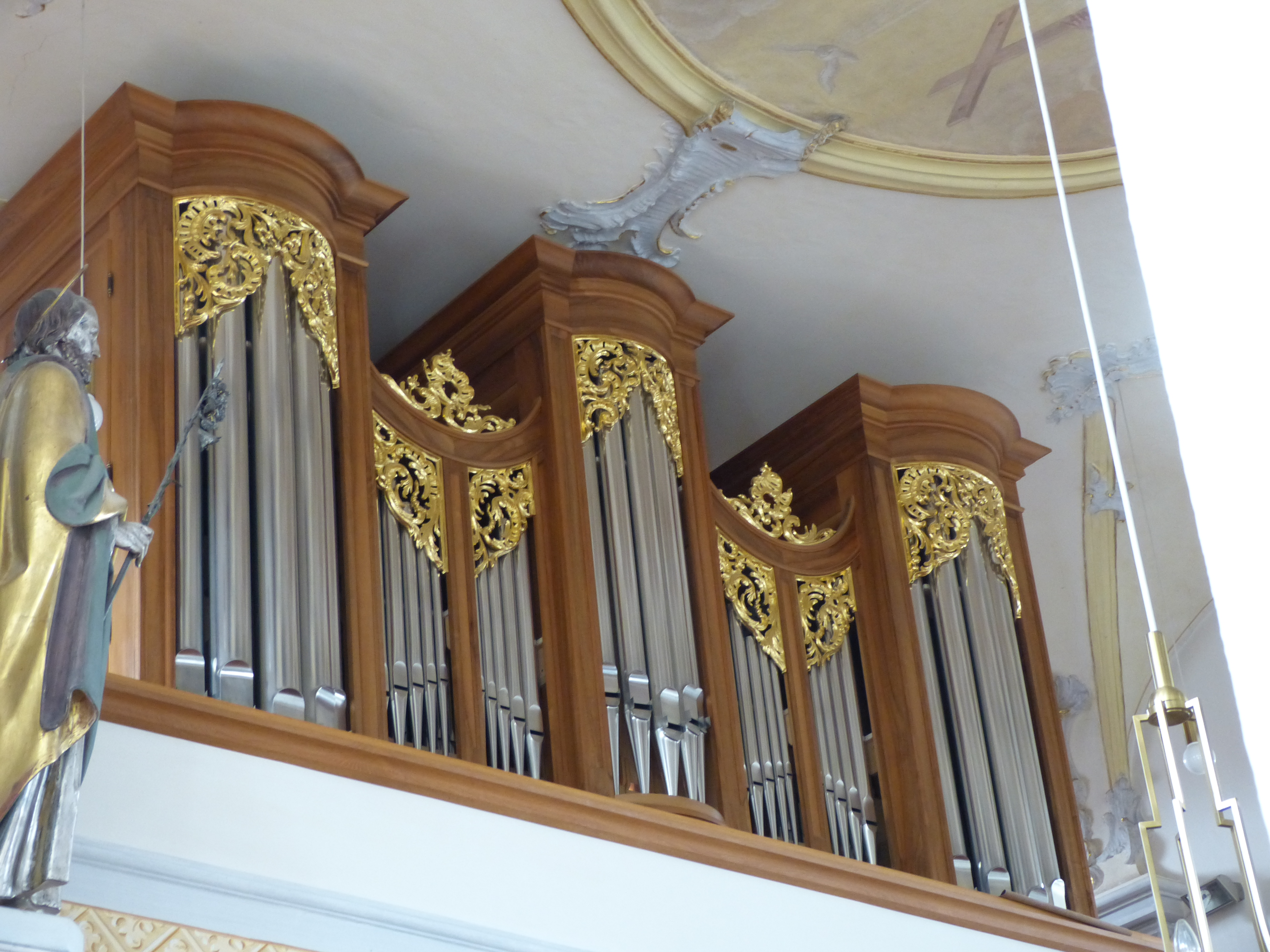 St. Martin, Winterrieden, Landkreis Unterallgäu, Bayern